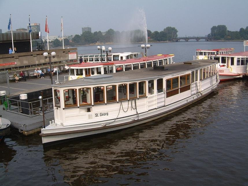 Alsterdampfer St.Georg am Anleger Jungfernstieg in Hamburg.